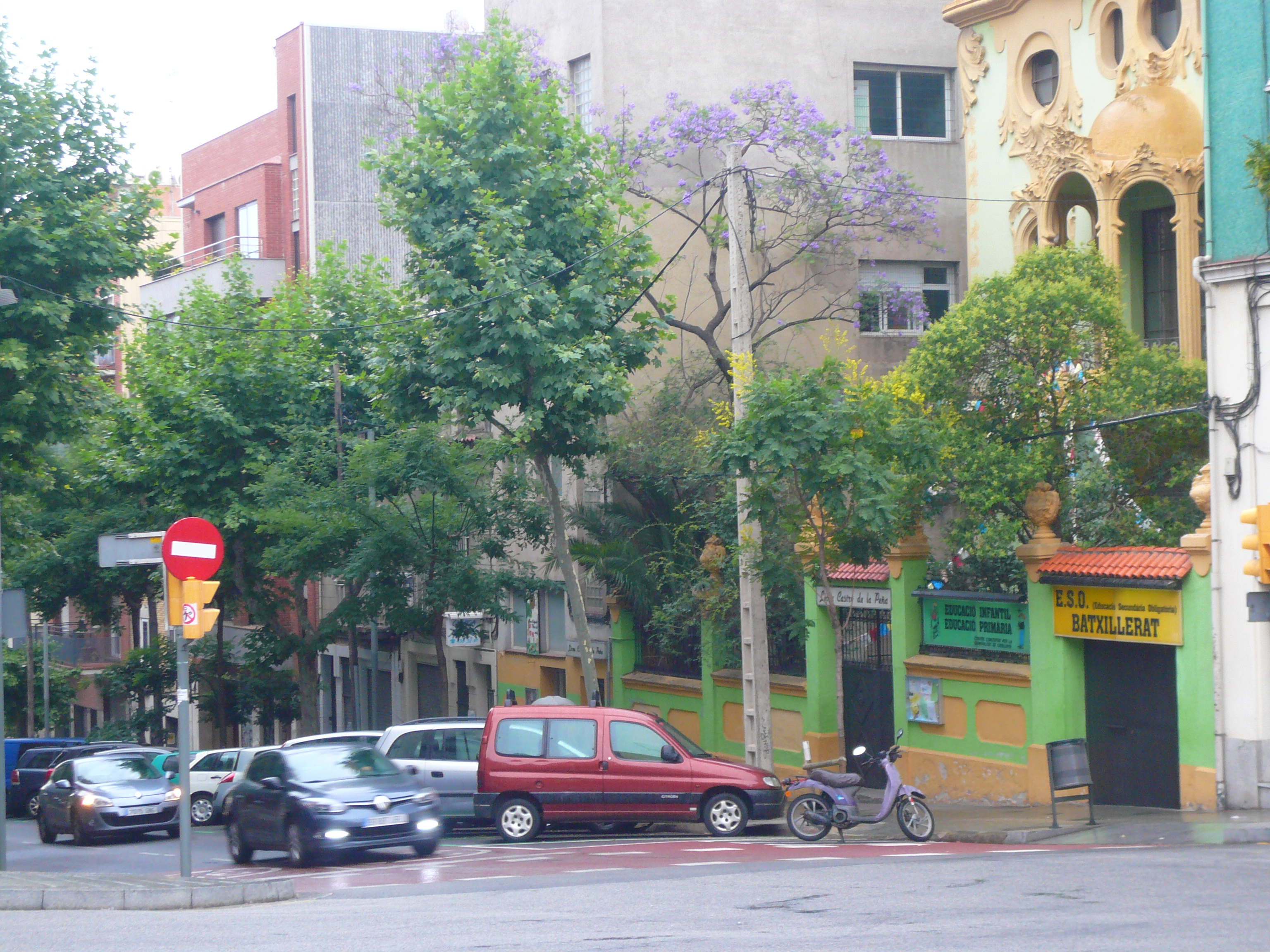 La rambla de Volart, vista des de la ronda del Guinardó un vespre de pluja (Barcelona).